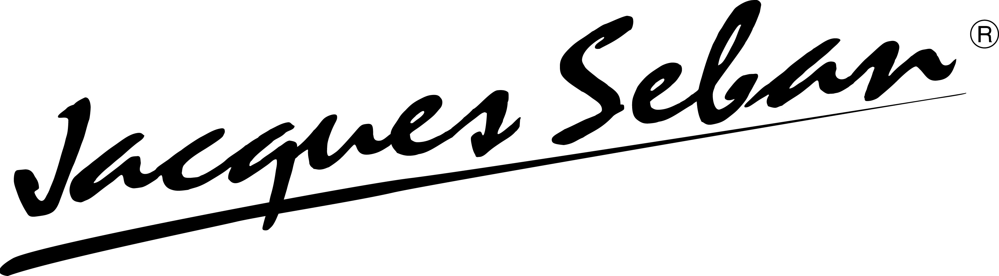 SIGNATURE M. JACQUES SEBAN